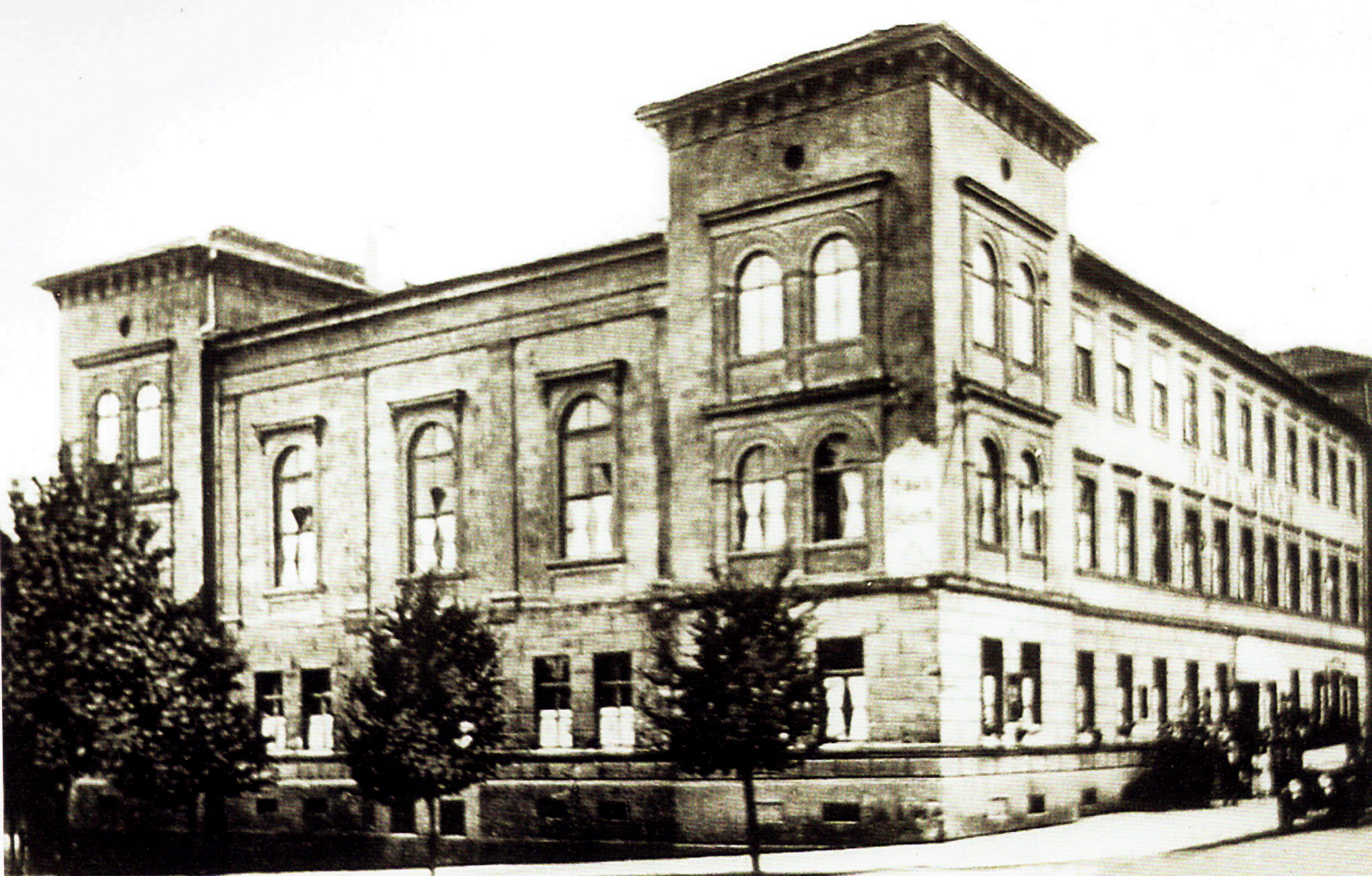 Hotel Münch in Sondershausen (Ecke August-Bebel-Straße/Florian-Geyer-Straße), erbaut von Carl Scheppig 1857, im April 1945 von Bomben zerstört